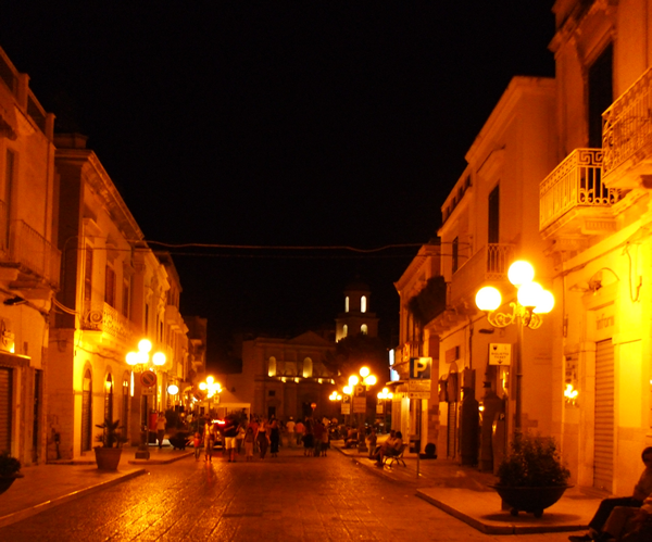 Corso San Sabino di notte